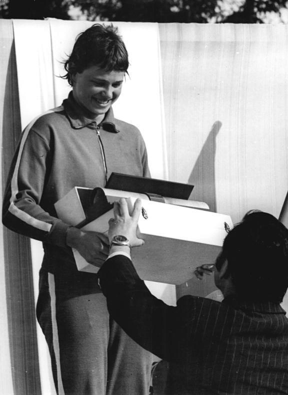 Ulrike Richter ADN-ZB Koch-B-8.7.74-Rostock: DDR-Schwimmeisterschaften-Ulrike Richter nahm heute (8.7.) aus den Händen von DTSB-Präsident Manfred Ewald (r.) für ihre beiden Weltrekorde im Rükenschwimmen den beiden DDR-Titelkämpfen traditionell vergebenen Ehrenpreis des Ersten Sekretärs des ZK der SED, Erich Honecker, entgegen.